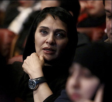 رویا نونهالی در اختتامیه سی و دومین جشنواره فیلم فجر